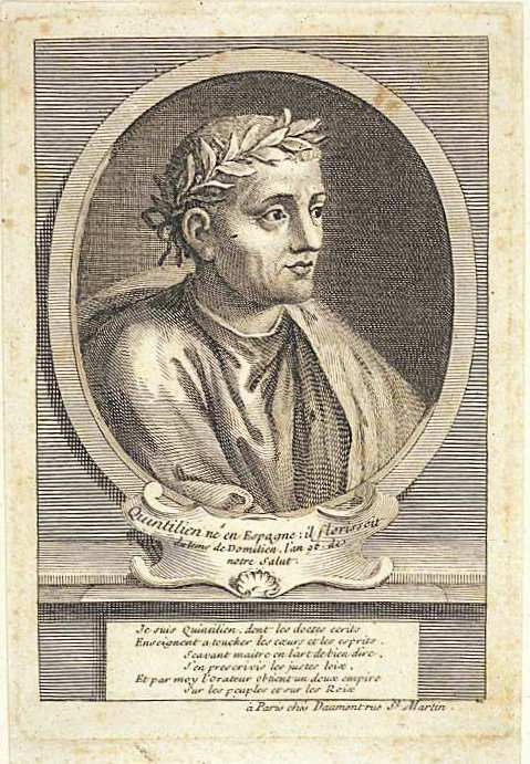 Marco Fabio Quintiliano. Inscripción: Quintilien né en Espagne: il florissoit du tems de Domitien l'an 96 de notre salut. En el pedestal, verso..Je suis Quintilien dont les doctes ecrits....A Paris chez Daumont rue St. Martin.